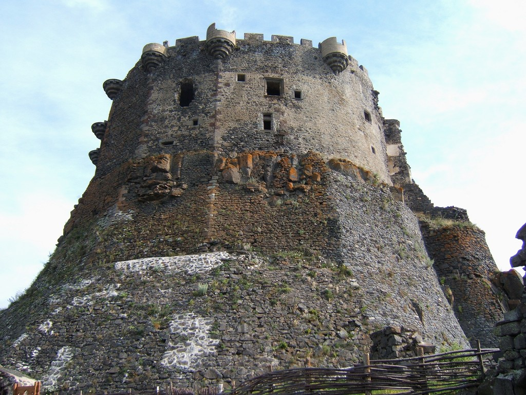 Château de Murol (France), vue détaillée du rempart